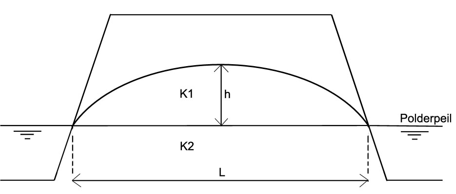 uitleg van de formule van Hooghoudt